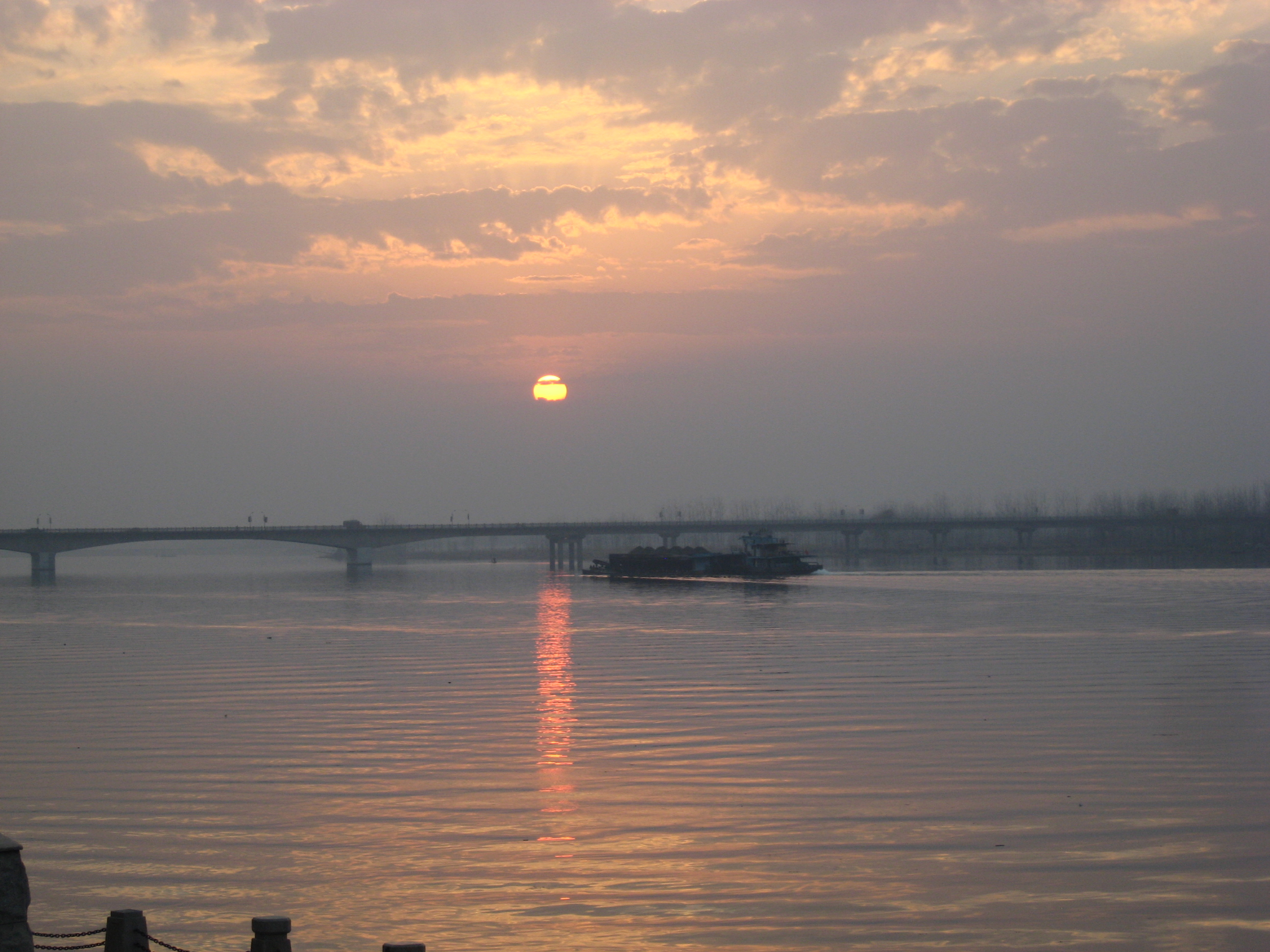 老河口汉江大桥的日落